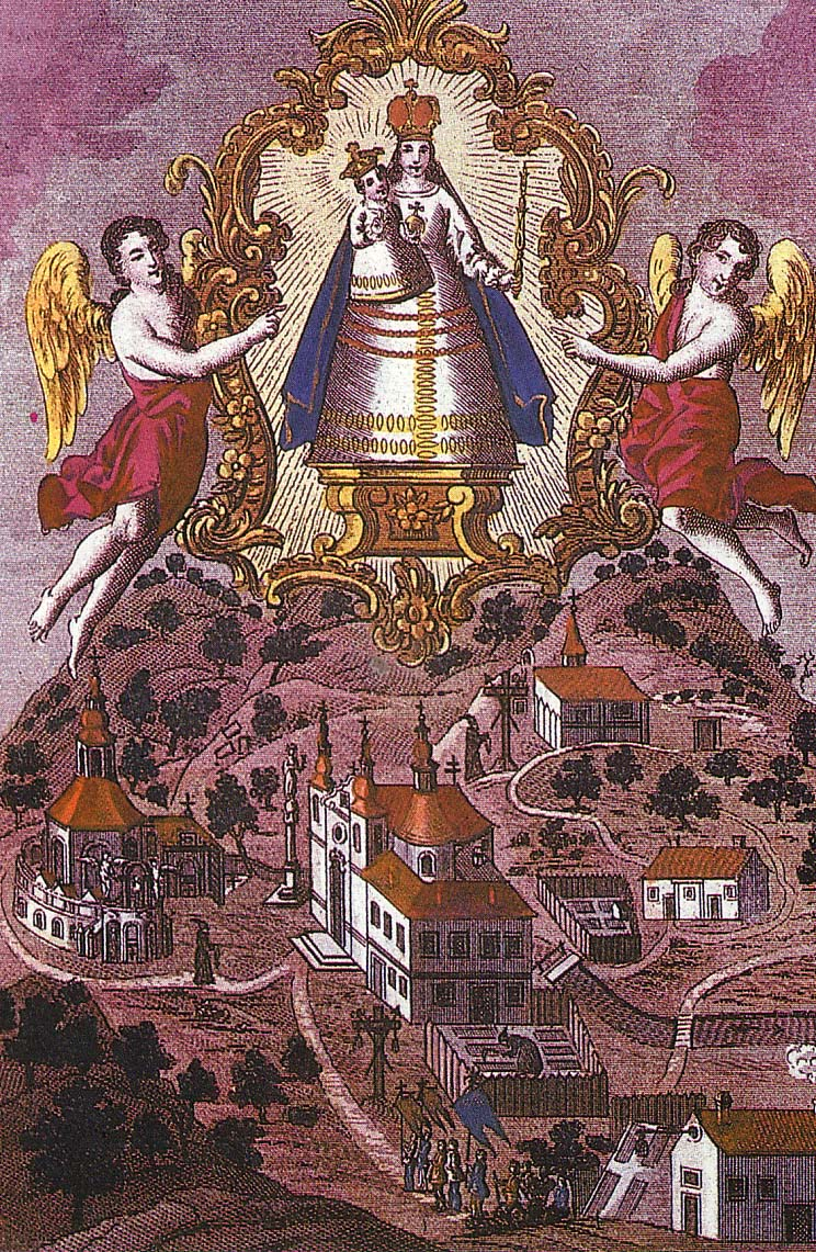 Mátraverebélyi Mária Jordánszky Elek 1836-os könyvében (A Magyar Országban 'saz ahoz tartozó részekben lévő Boldogságos Szűz Mária Kegyelem' képeinek rövid leírása. Posonban, 1836)